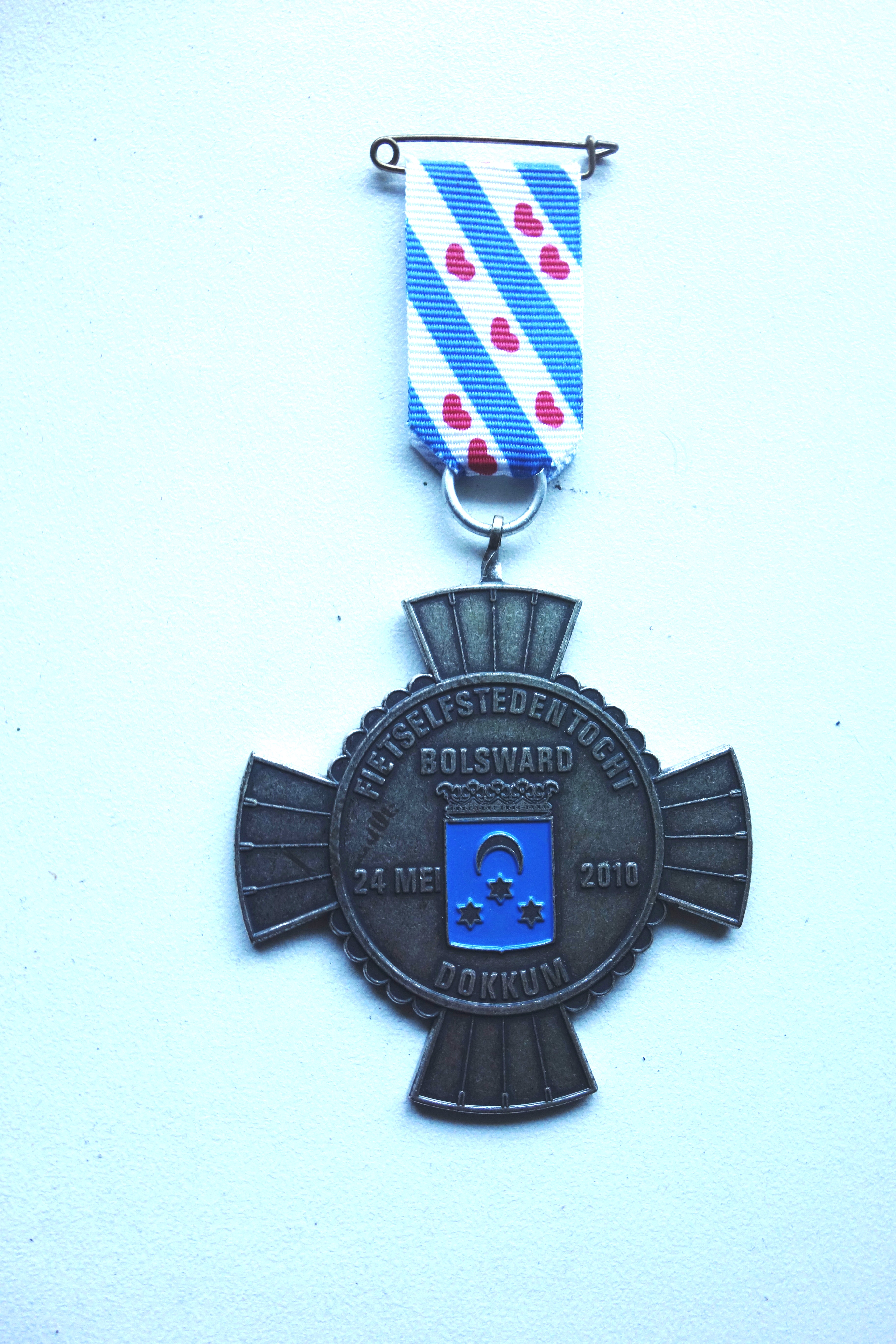 Medaille Fietselfstedentocht 24 mei 2010, Bolsward - Dokkum